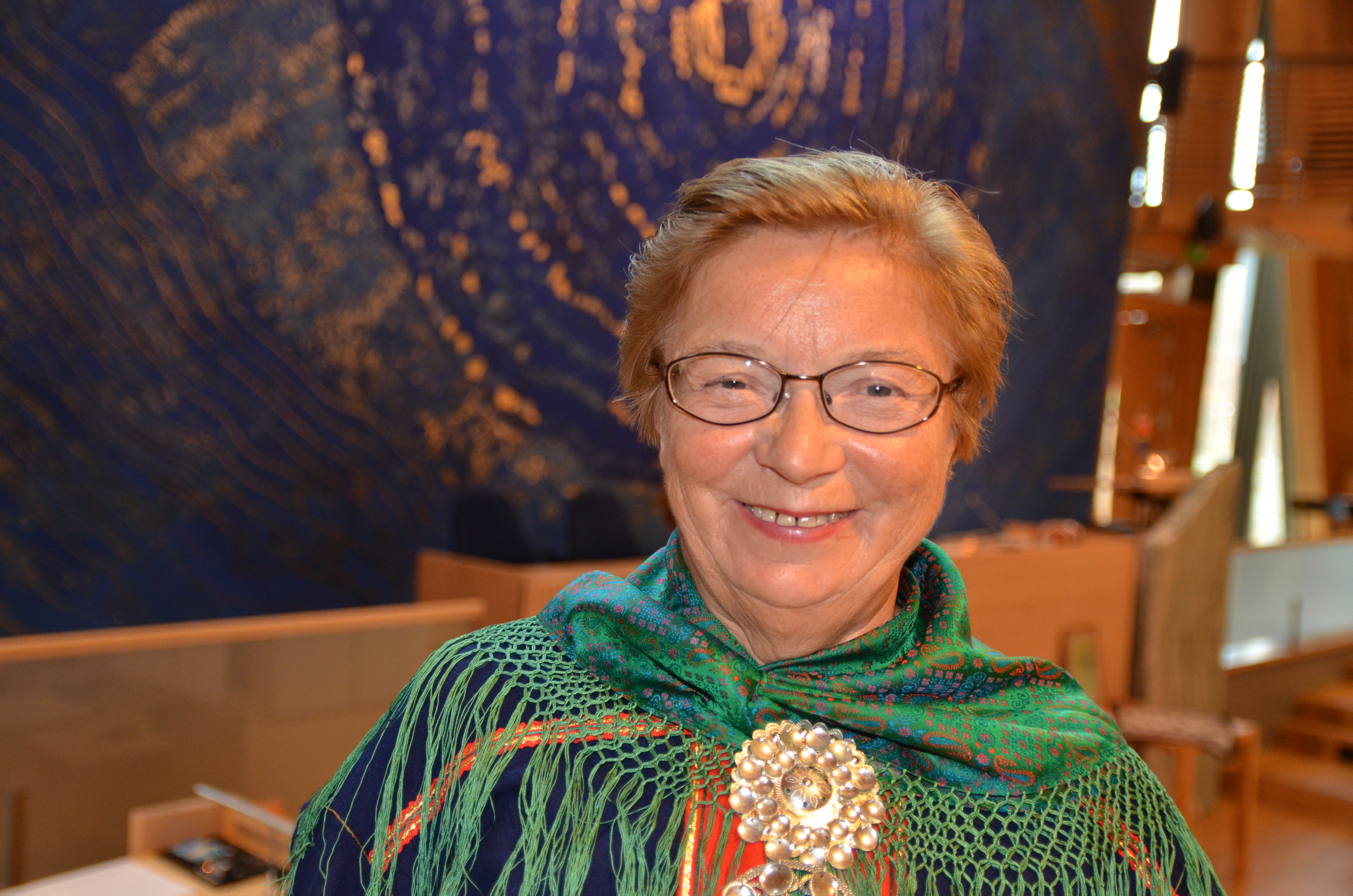 Sametinget markerte sine første 25 år med seminar 9. oktober 2014. du finner innleggene her